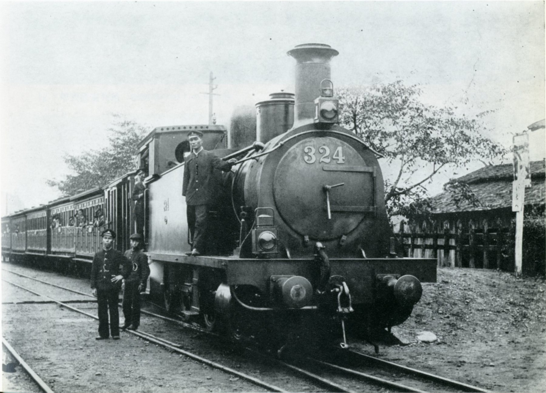 磯部駅に停車する信越線の列車。牽引機関車は324、のちの2213。右に磯部の駅名標が見える。交通博物館(当時)所蔵。撮影時期は『日本国有鉄道百年写真史』P99では明治34年(1901年)頃、『新日本鉄道史』では明治35年(1902年)頃としている。下に示すバージョンはトリミングされているが、画質はより鮮明である。